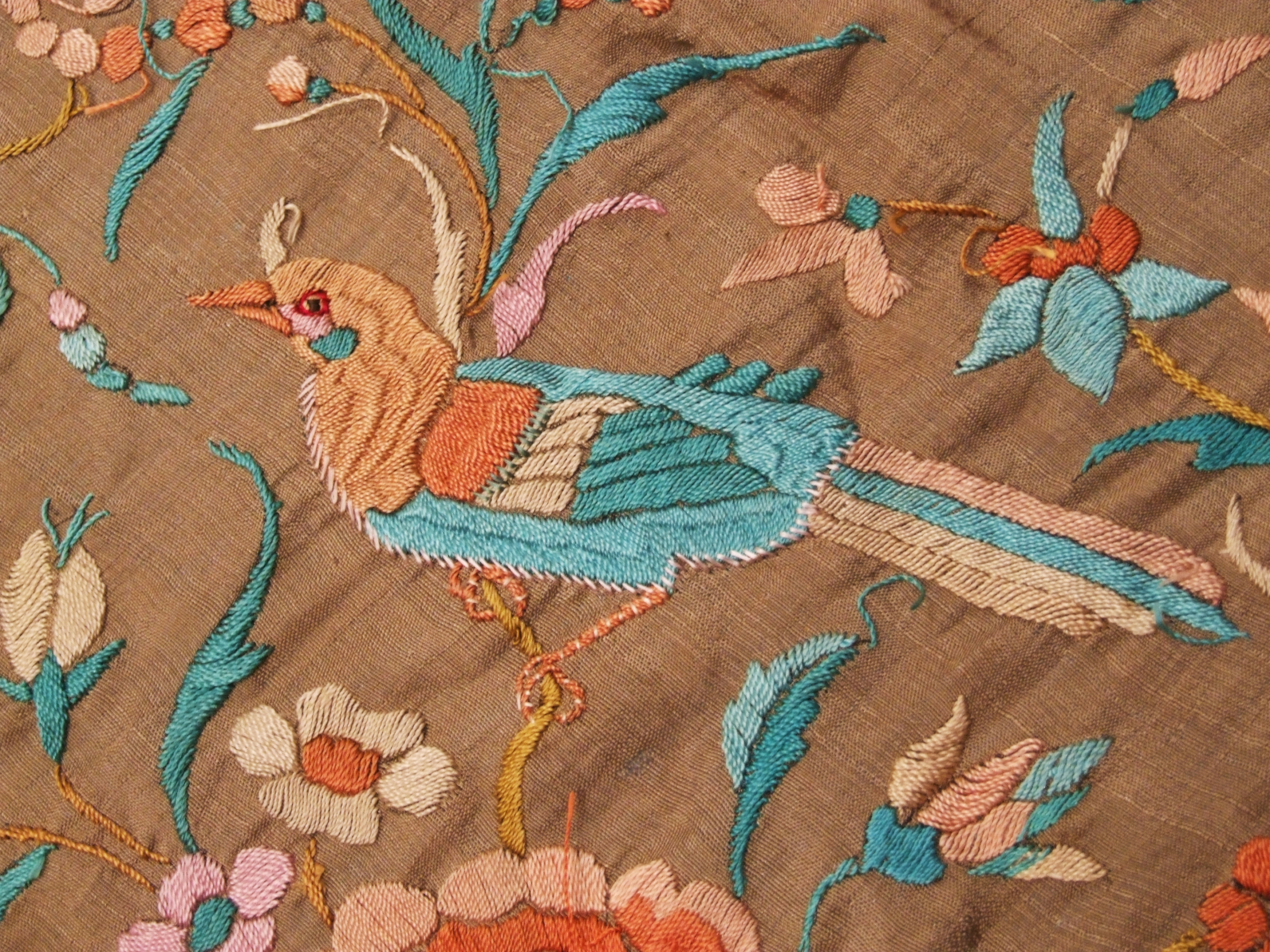 Detalle de un mantón de Manila perteneciente a una familia manchega de principios del siglo XX.